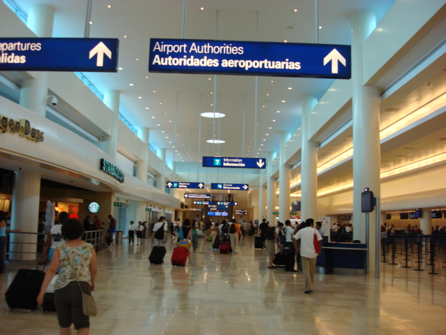 Ambulatorio de la Terminal 3 del Aeropuerto Internacional de Cancun